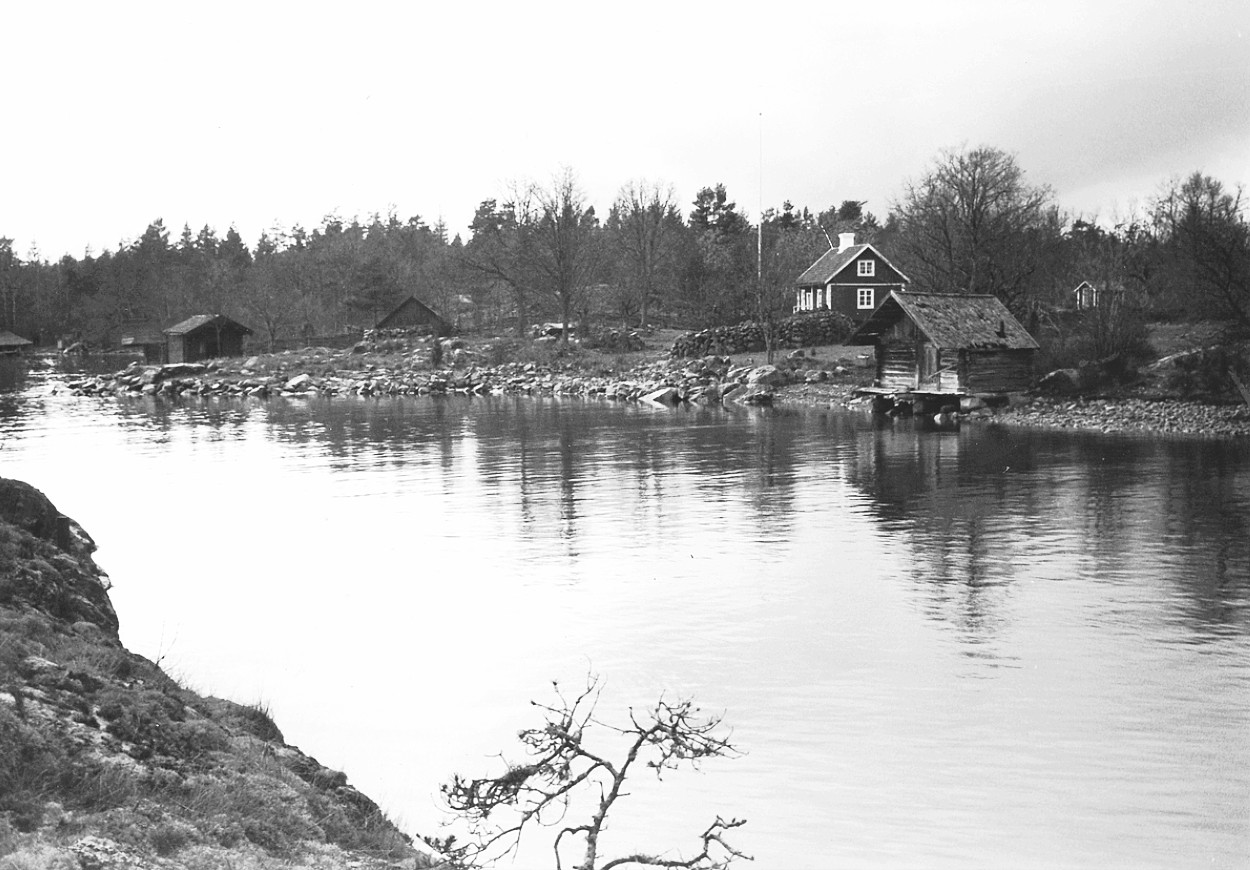 Simpevarps ursprungliga bebyggelse